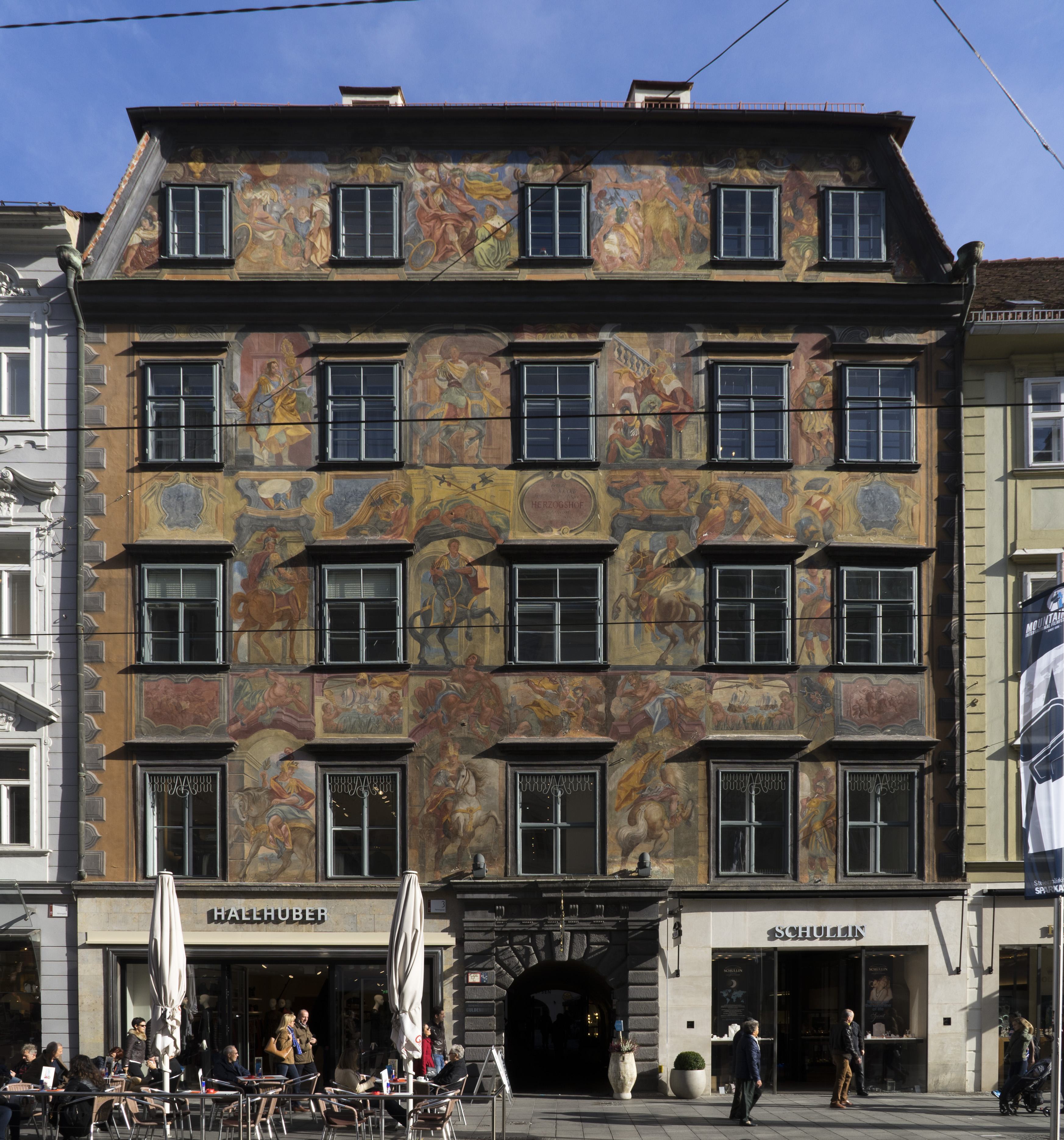 The Herzogshof Graz also called the painted building